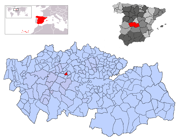 Erustes en la provincia de Toledo